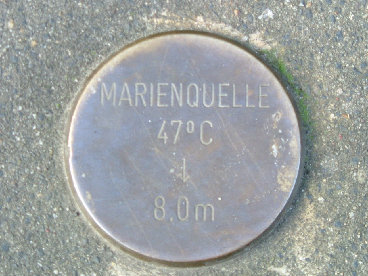 Messingplakette mit Hinweis auf Lage und Temperatur der Marienquelle in der Komphausbadstrasse